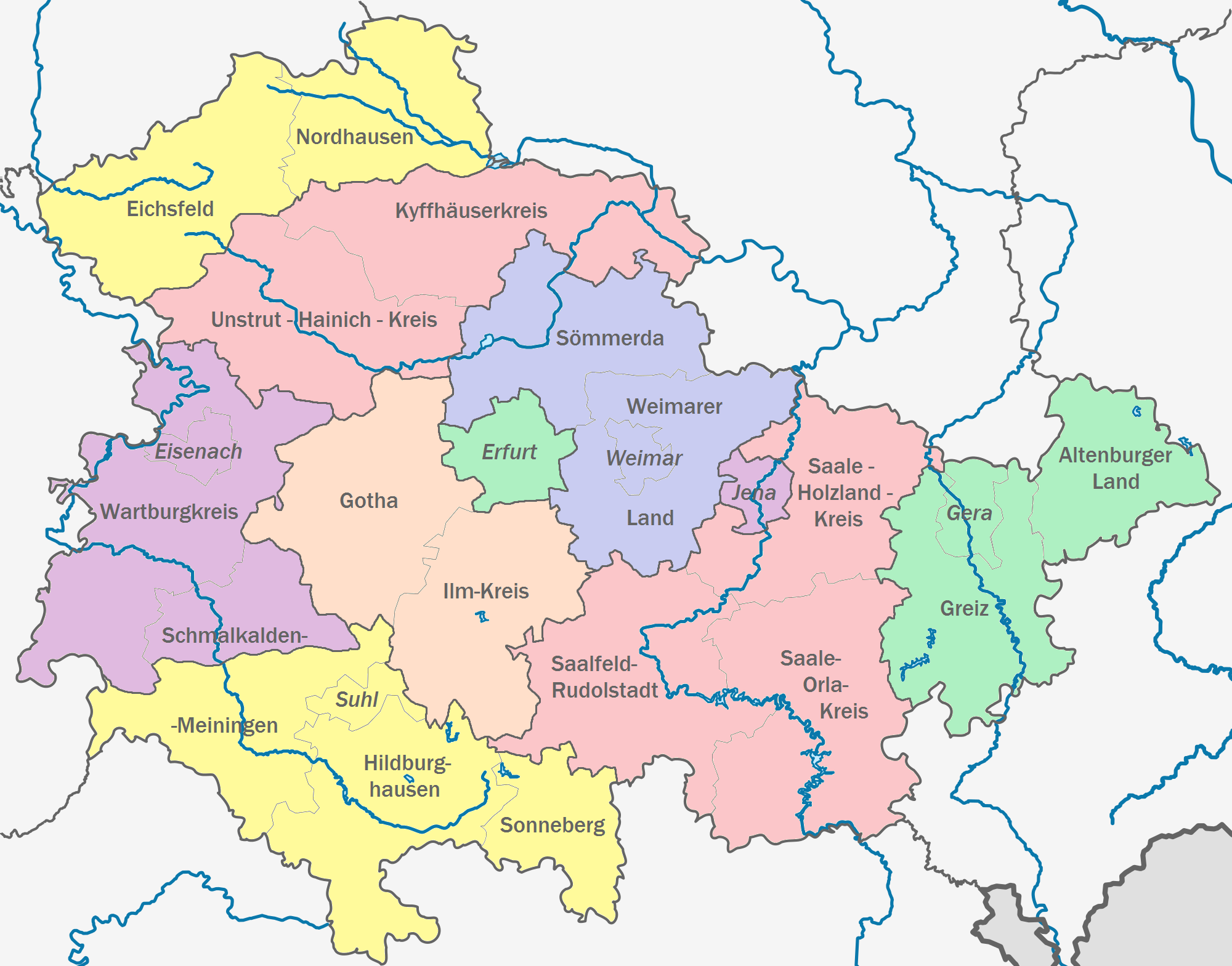 Karte des Vorschlags zu einer Kreisgebietsreform in Thüringen durch die von der Landesregierung beauftragte Expertenkommission.